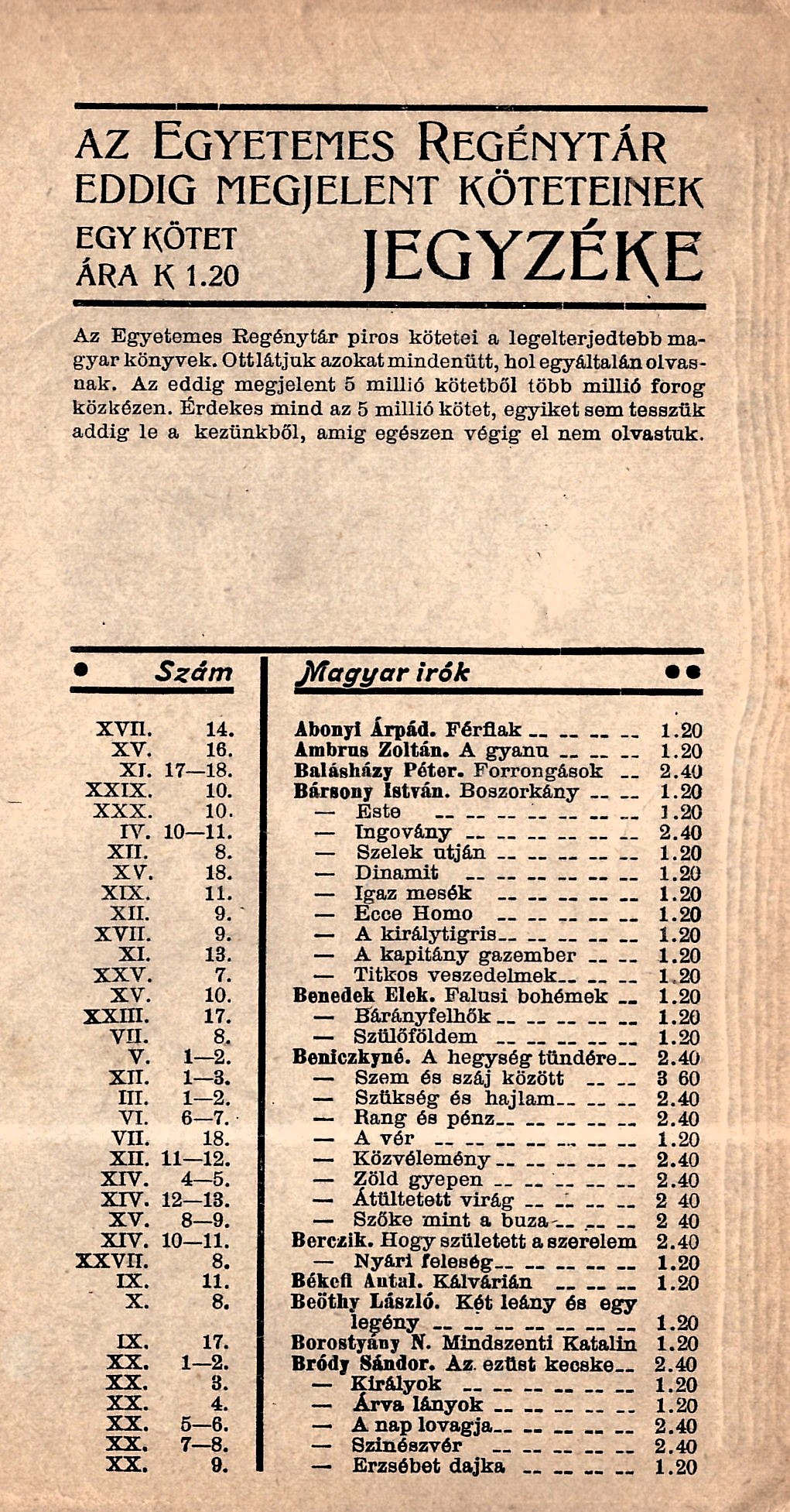 Az Egyetemes regénytár köteteinek jegyzéke (előzéklap Arthur Conan Doyle [1859-1930]: Napoleon [1911, Egyetemes regénytár] kiadásában)